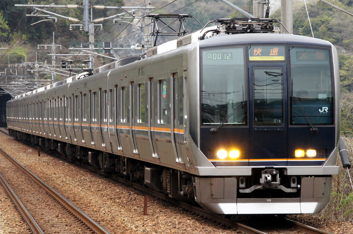 JR西日本321系（JR宝塚線）